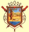 Escudo de la barriada de El Palo (Málaga)